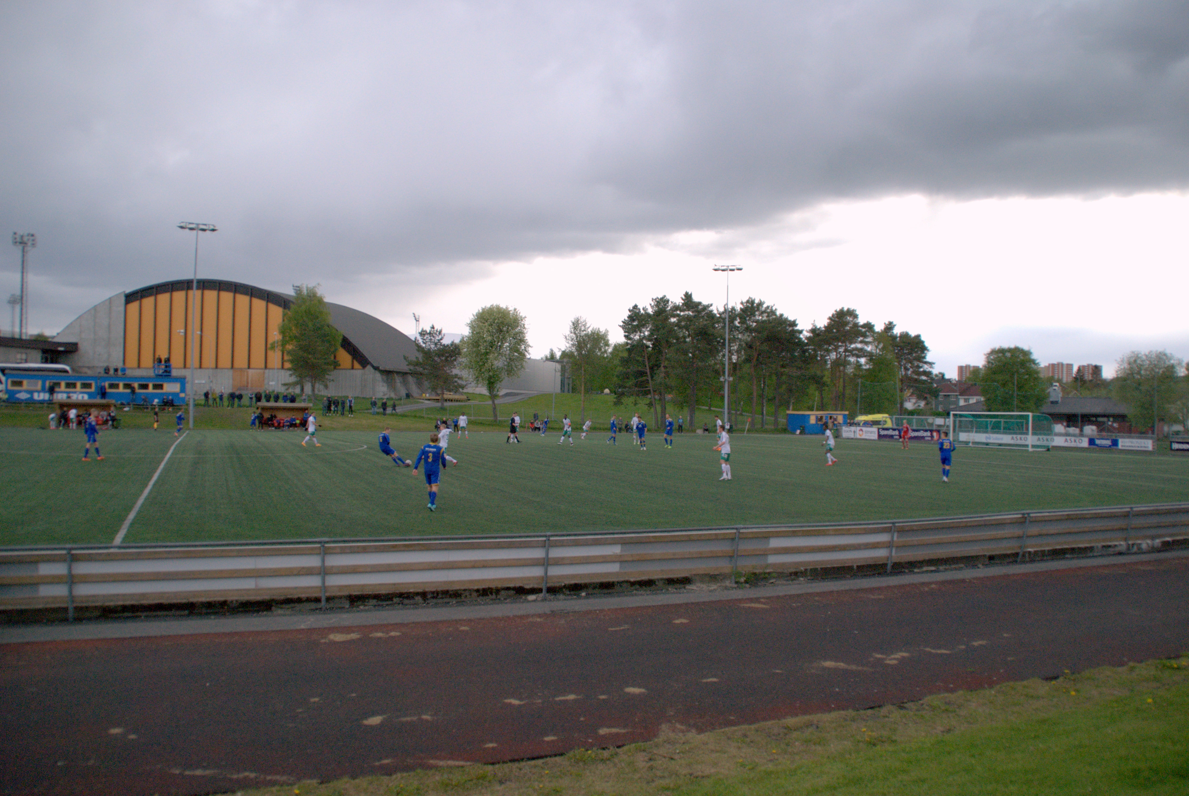 Strindheim kunstgressbane under en kamp mellom Strindheim og Hamarkameratene i Oddsenligaen, avdeling 4, 2015.